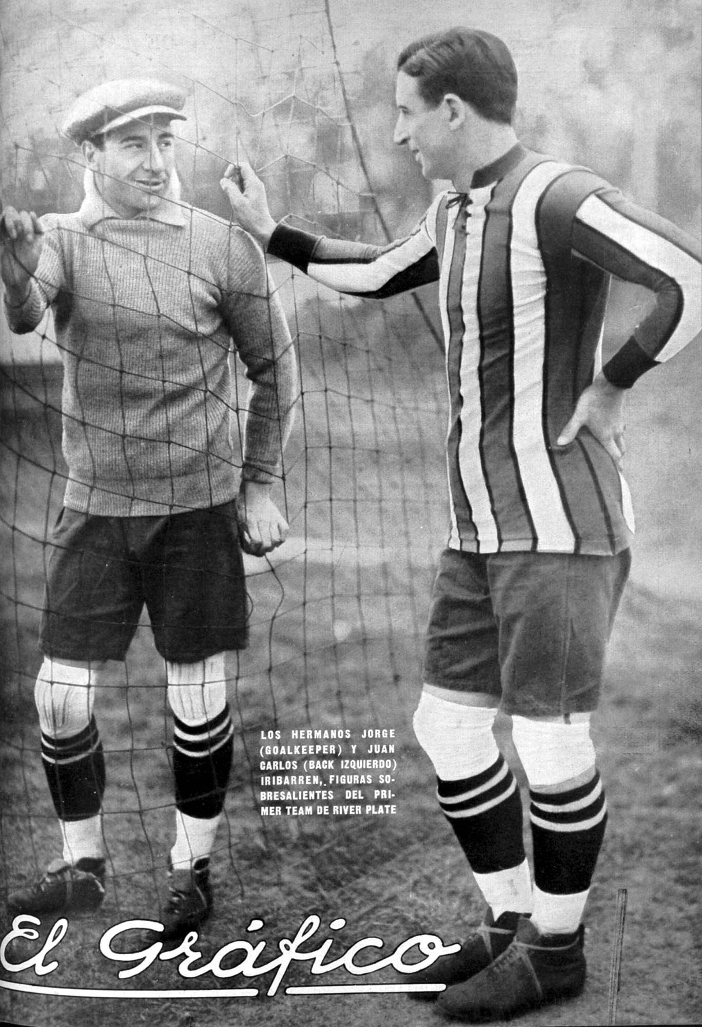 El Grafico del 11 de Octubre de 1930. Edicion 587